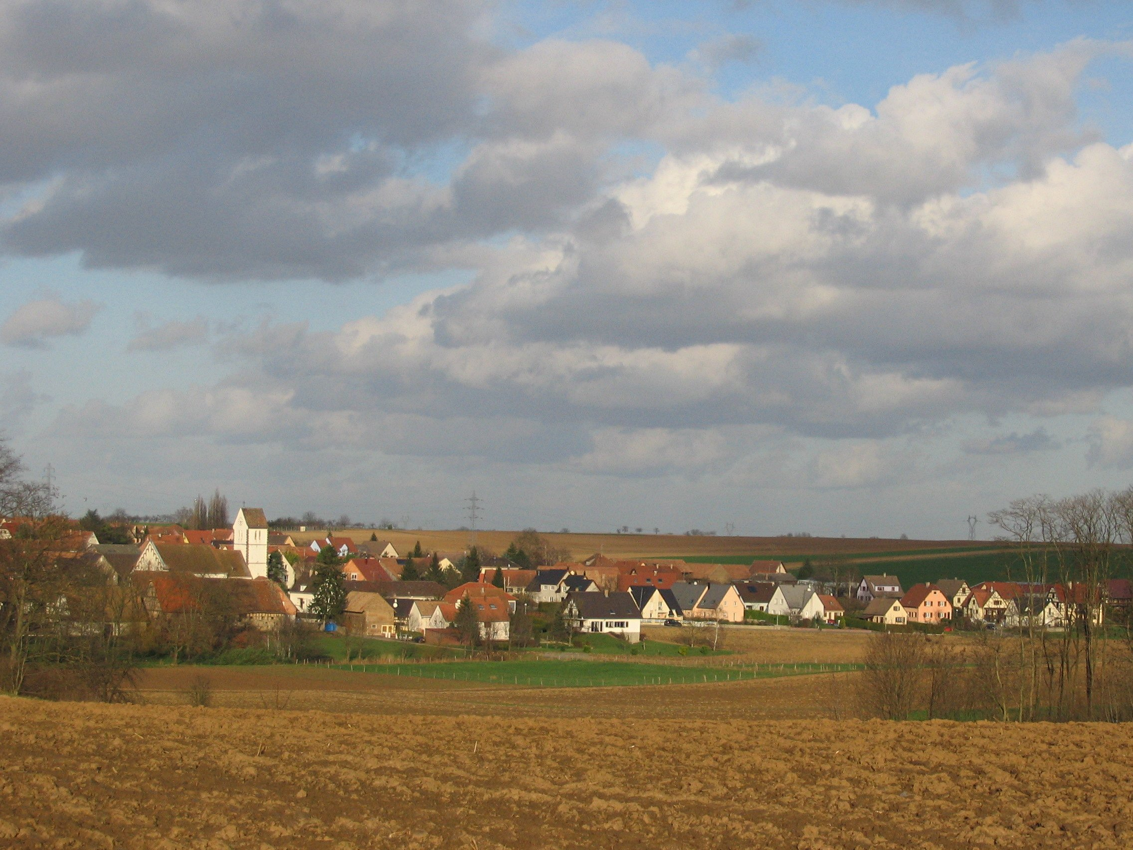 Le village de Pfettisheim (Bas-Rhin)